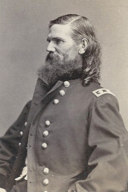 Union general Elias Smith Dennis (1812–1894)